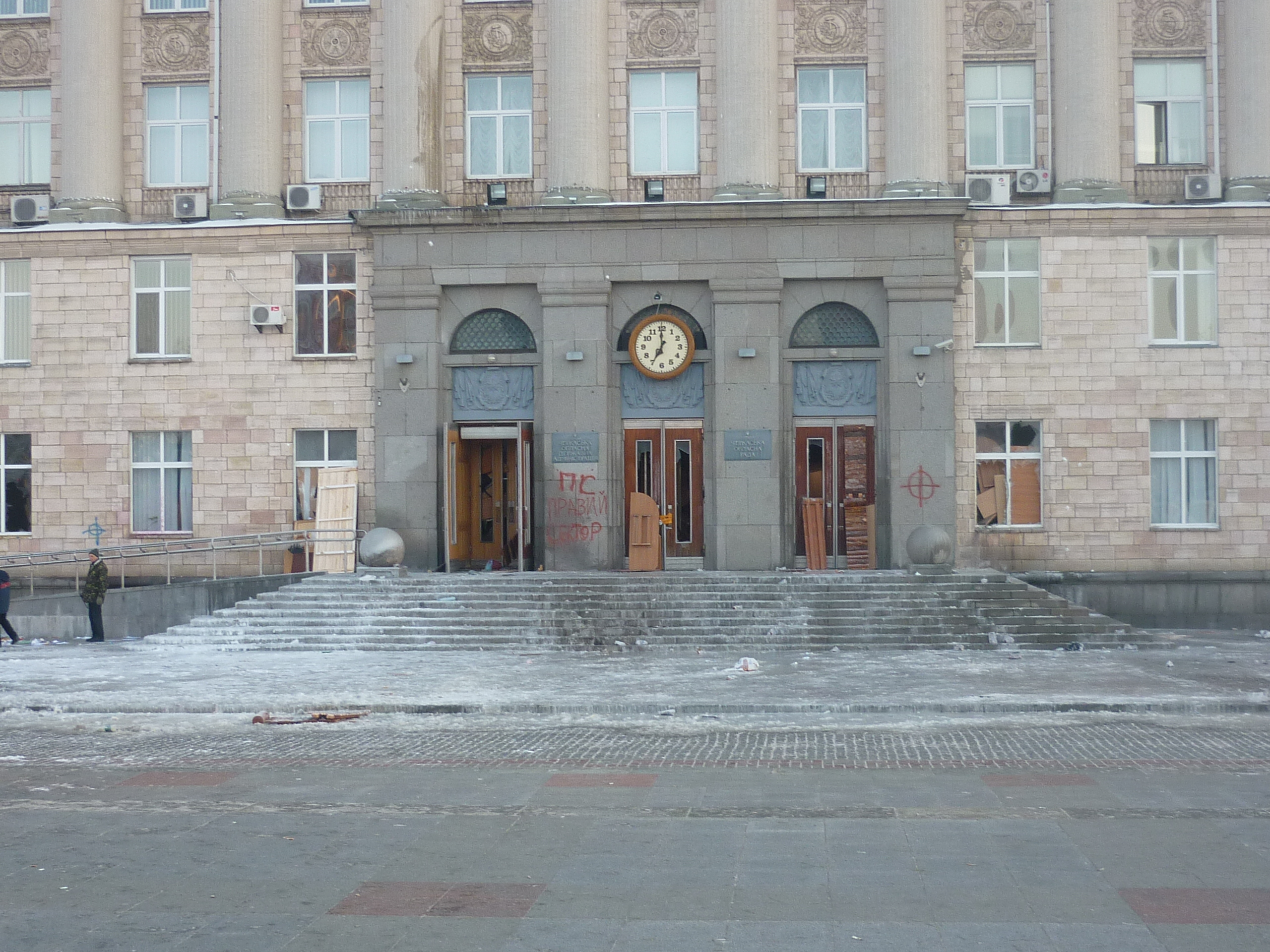 Черкаська обласна рада після євромайданівської ночі 23.01.2014. Напис біля входу: Правий сектор